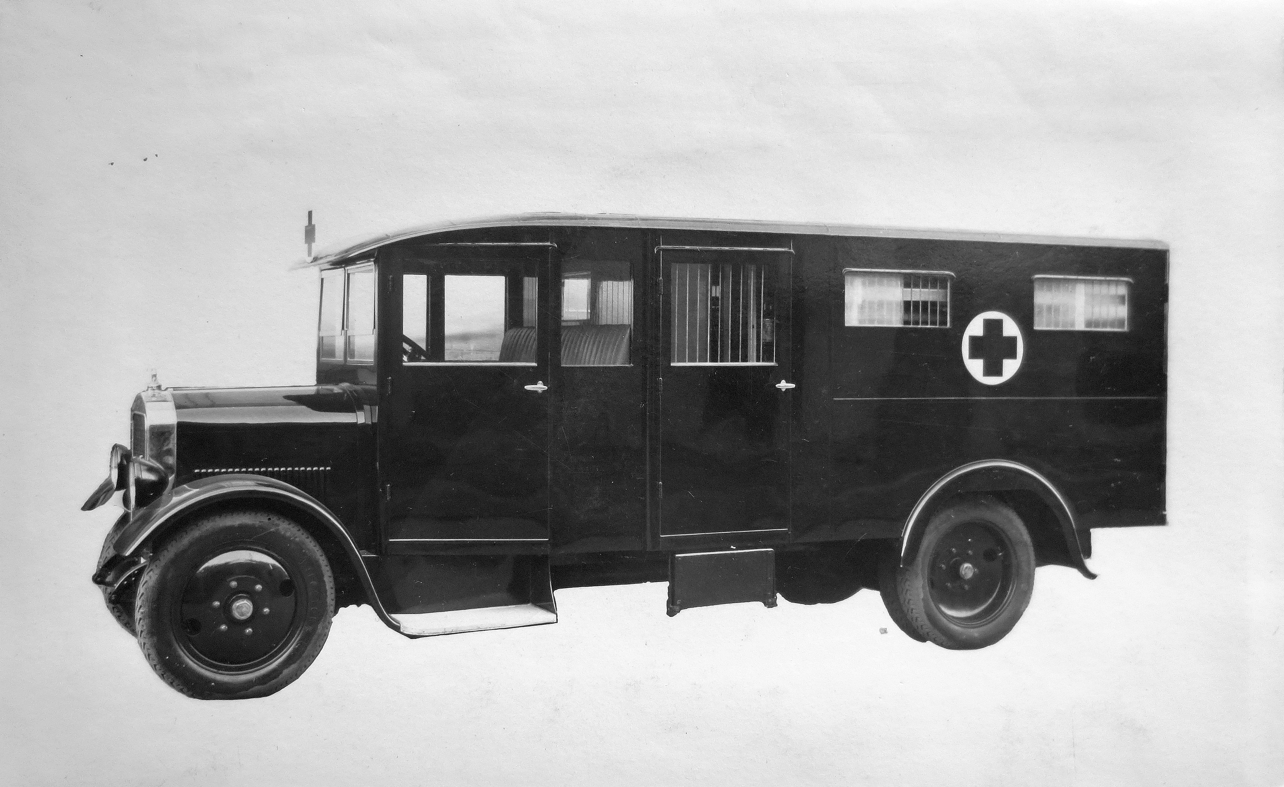 Walter PN sanitní vůz (1929)